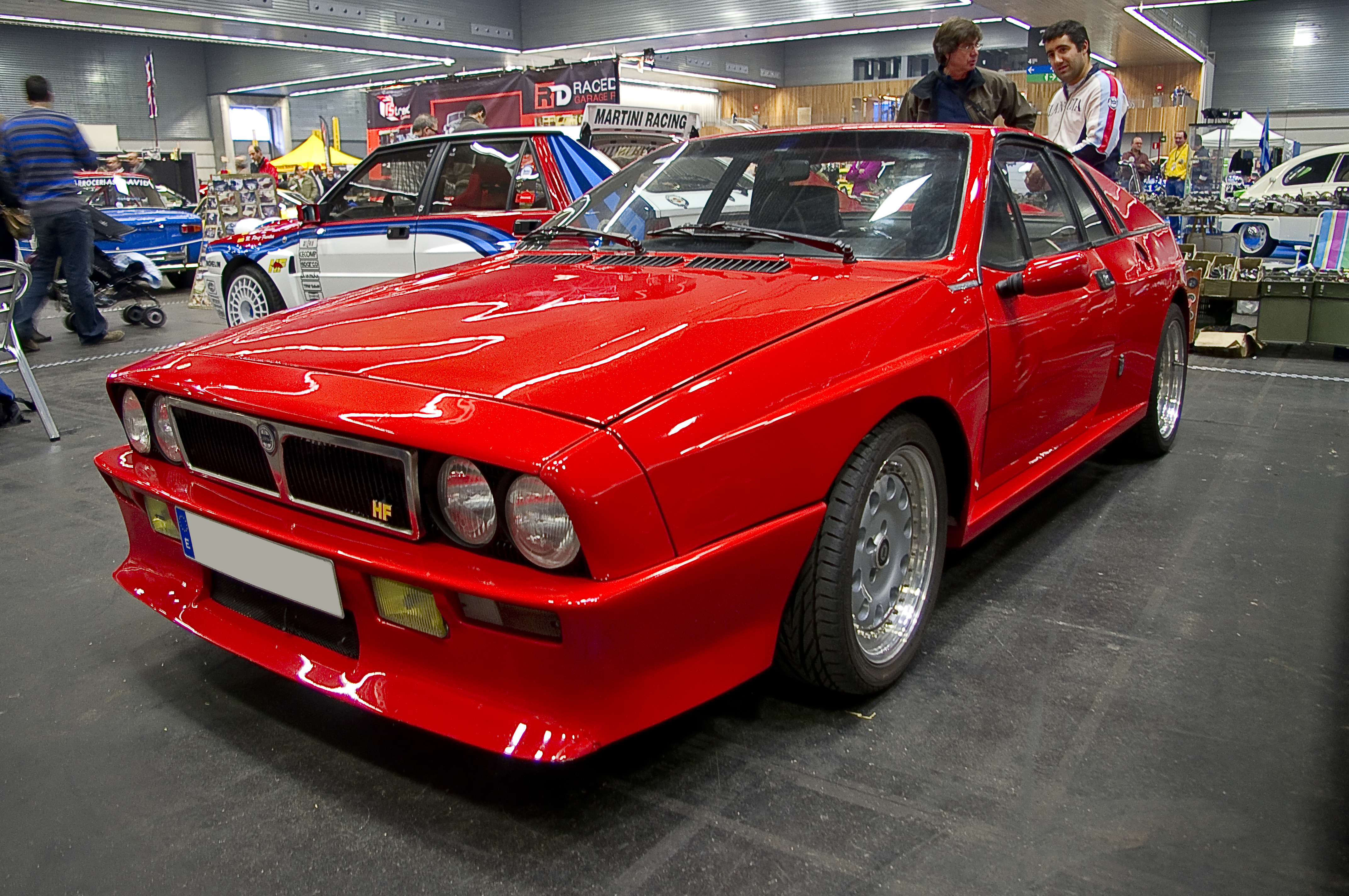 Lancia Beta Montecarlo dressed up as 032